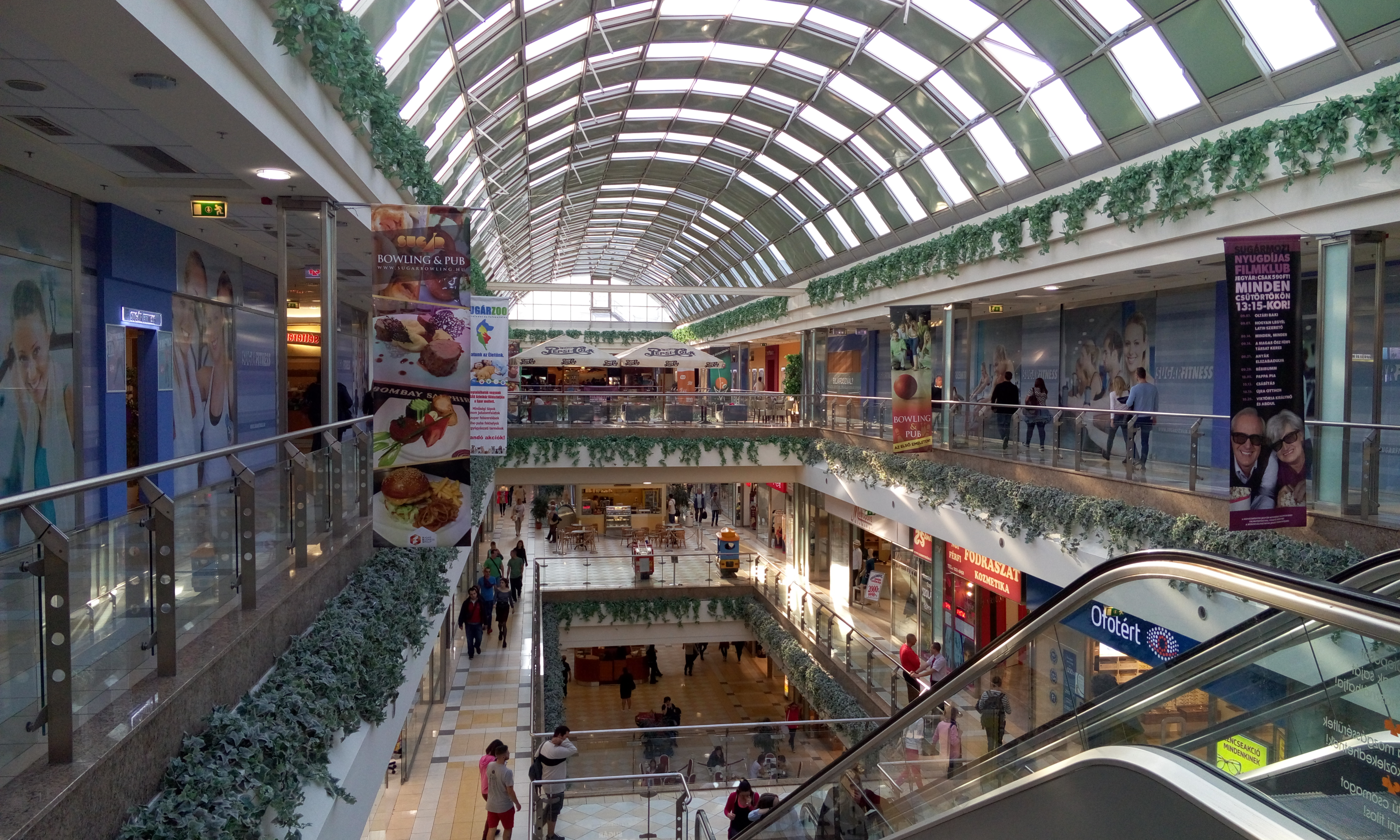 Budapest, Sugár Üzletközpont